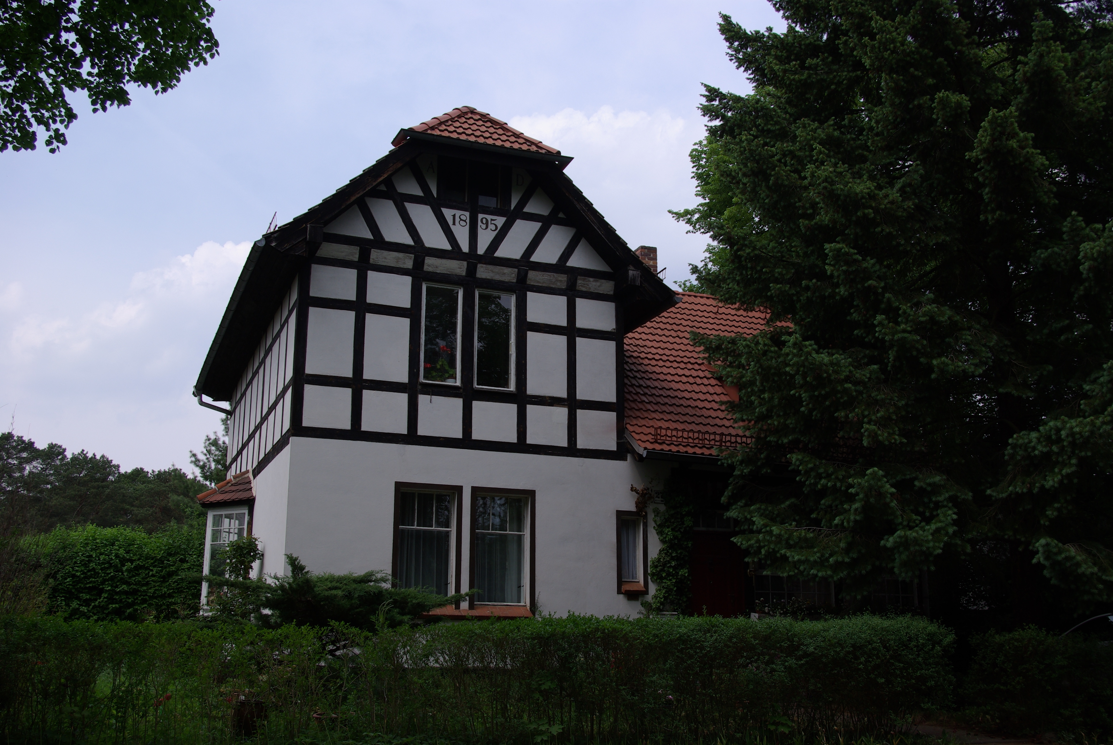 Schmöckwitz in Berlin. Das Haus in der Straße Schappachstraße 27 steht unter Denkmalschutz.